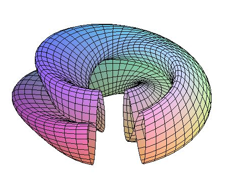 Bouteille de Klein, formée à partir d'un cylindre dont les bases sont en forme de 8, juste avant que ces bases soit recollées pour former la bouteille.